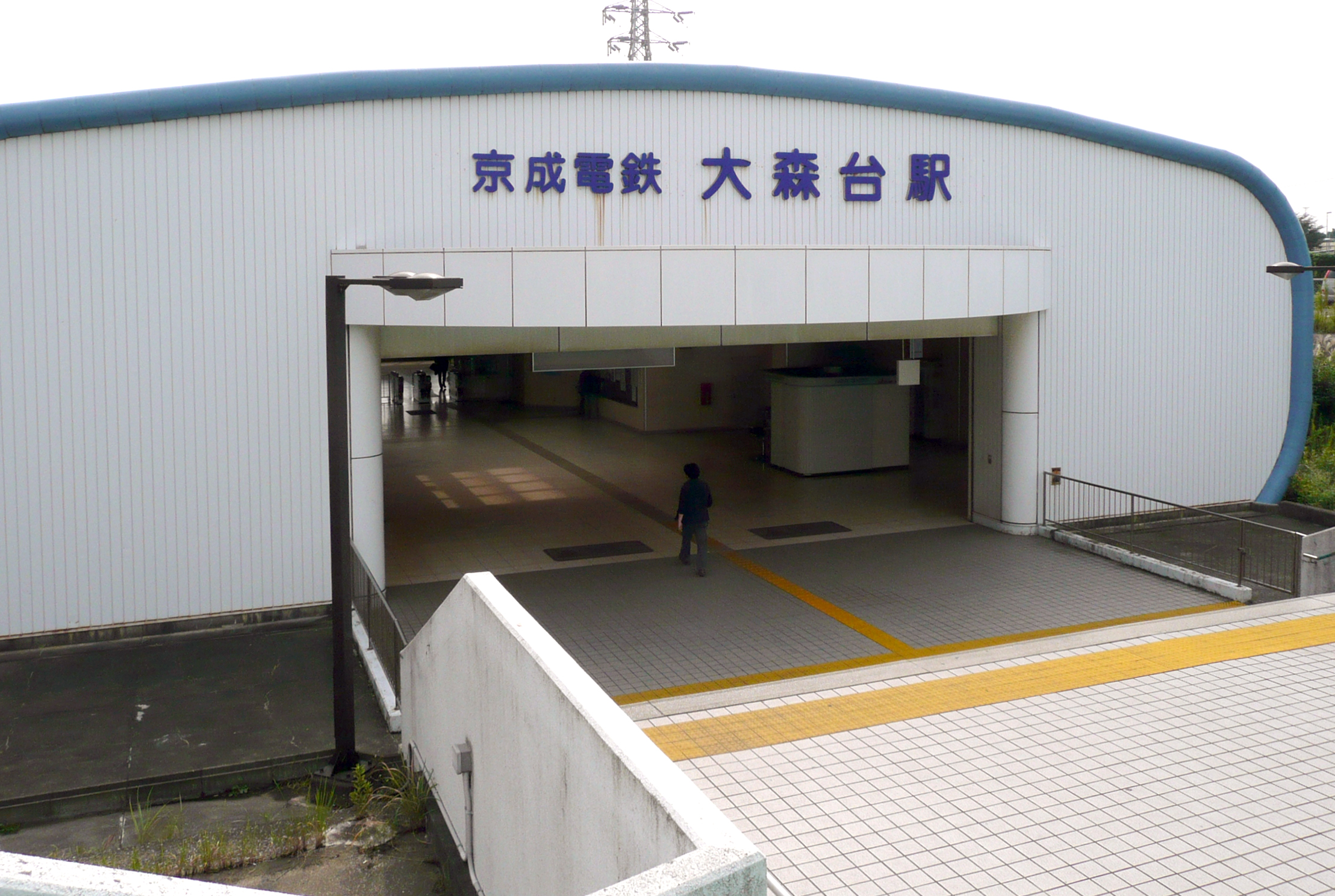 大森台駅